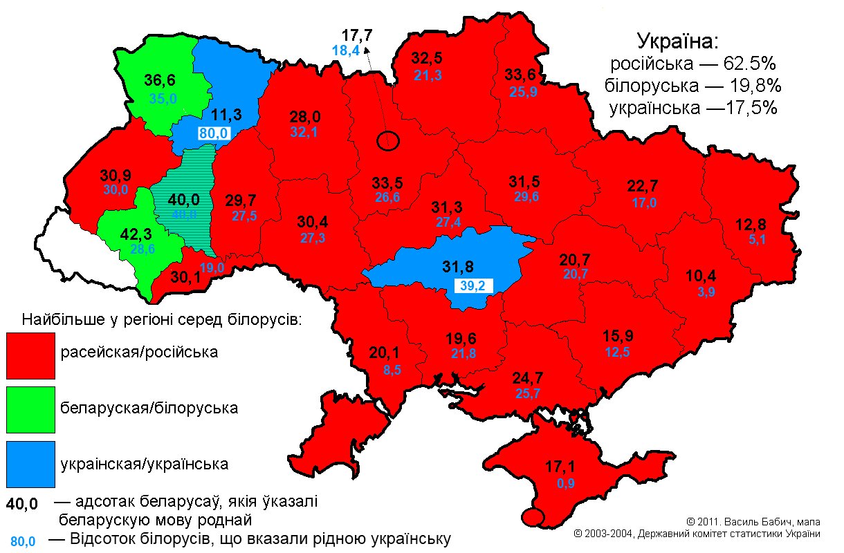 Беларуская (тарашкевіца): Беларуская мова сярод беларусаў ва Ўкраіне, па выніках перапісу 2001 году.